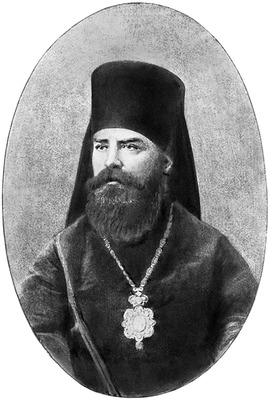 Арсений (Стадницкий), архиеп. Псковский